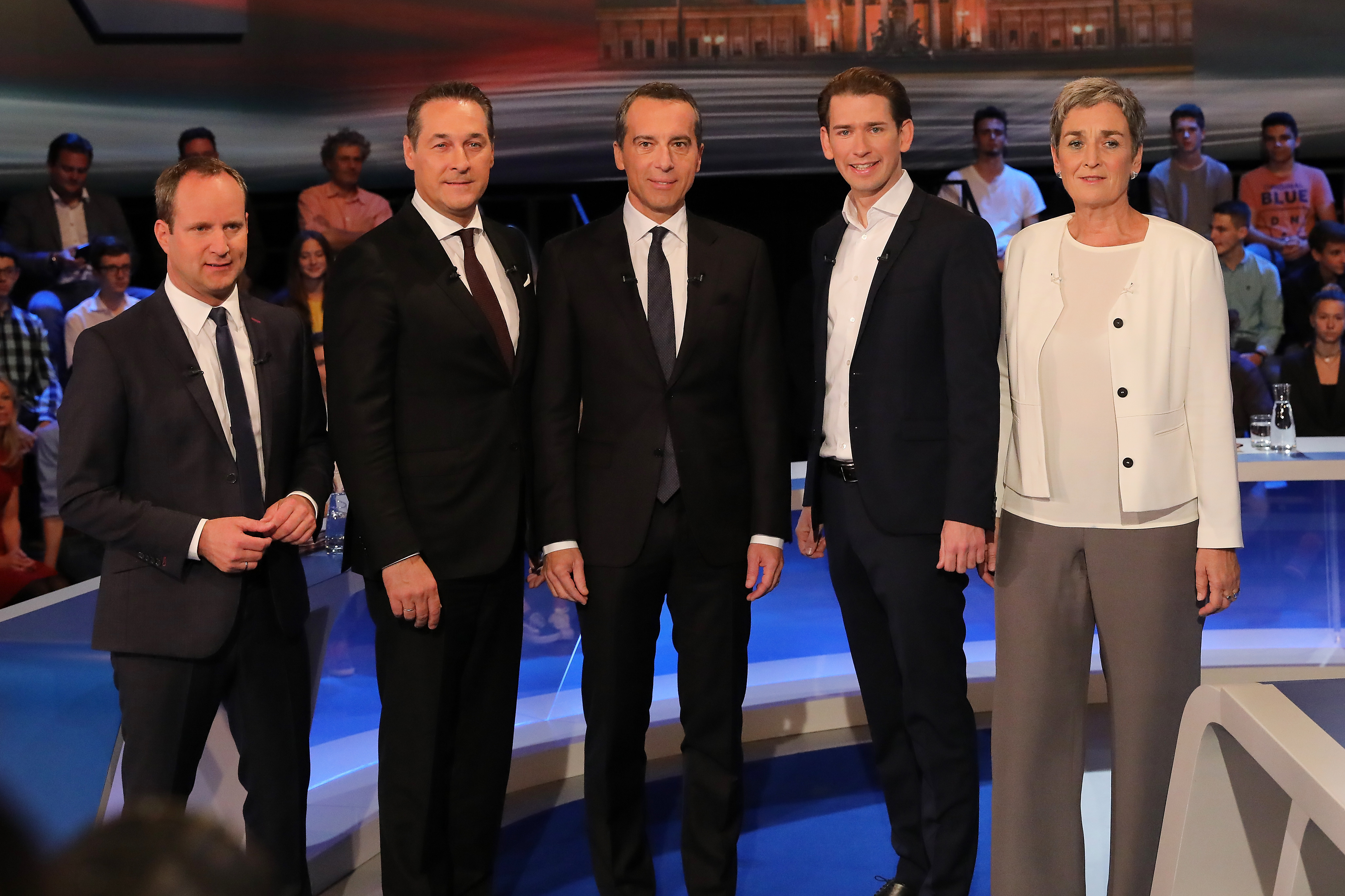 ORF-Elefantenrunde am 13. Oktober 2017. Bild zeigt Matthias Strolz, Heinz-Christian Strache, Christian Kern, Sebastian Kurz und Ulrike Lunacek.